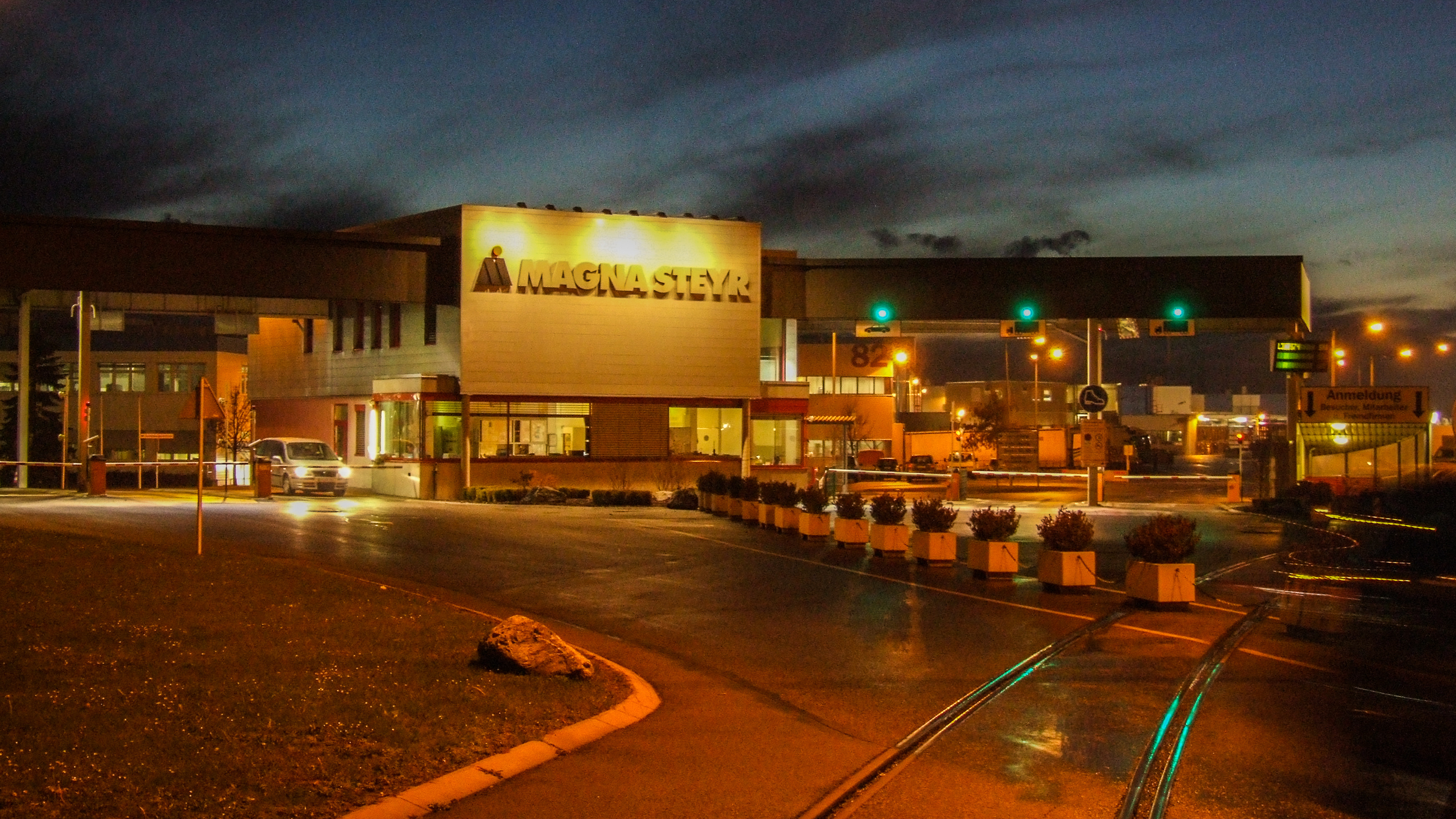 Werkstor der MAGNA STEYR Fahrzeugtechnik AG & Co KG in Graz, Oesterreich.